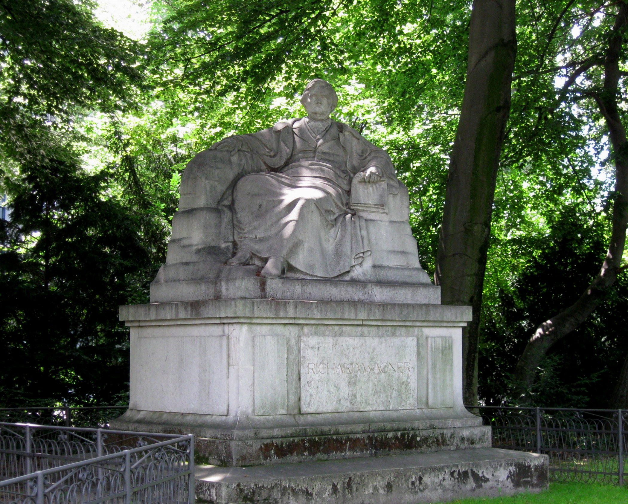 Denkmal für Richard Wagner in München-Bogenhausen am Prinzregentenplatz; 1913 von Bildhauer Heinrich Waderé